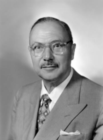 Senatore Antonio Azara